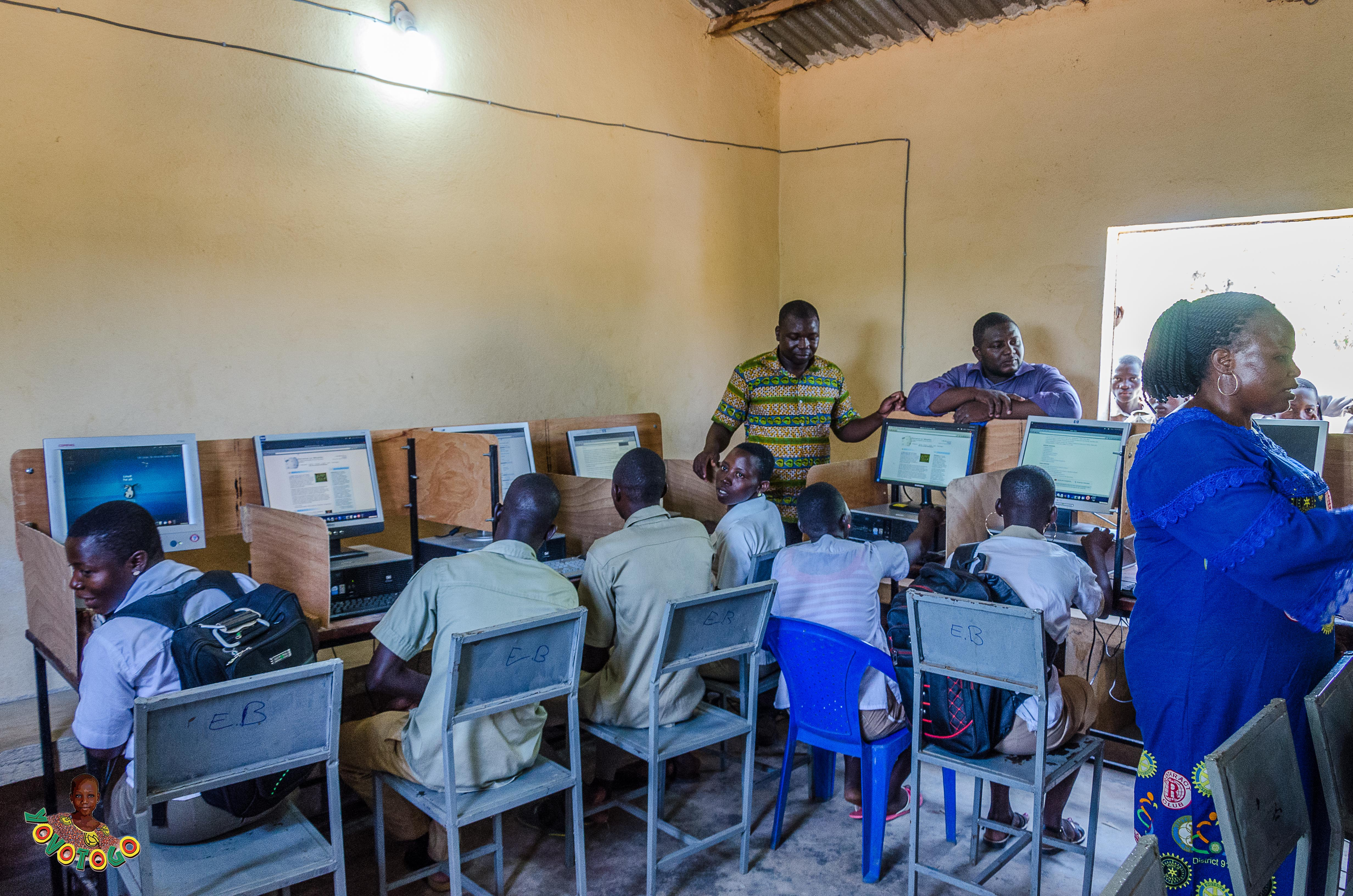 Journée de l'inauguration de la salle équipée de 20 ordinateurs reconditionnés sous Emmabuntüs